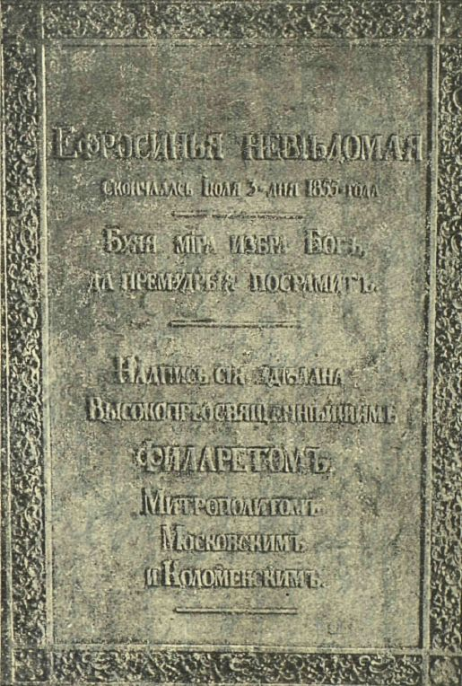 Могильная плита на гробнице преп. Евфросинии